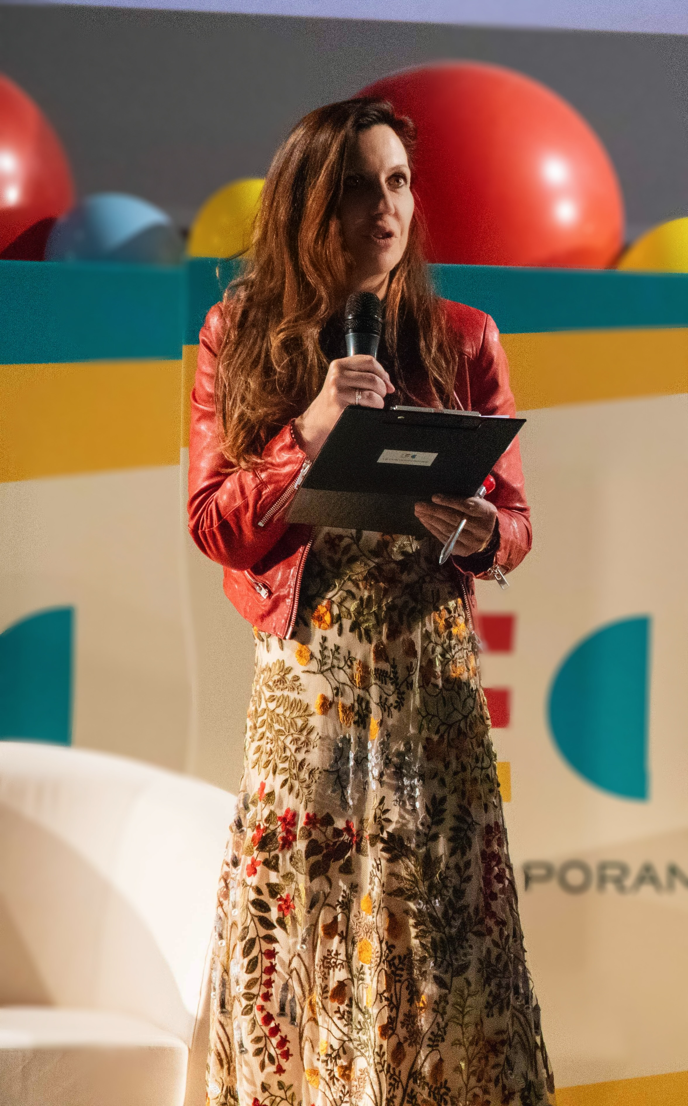 Cristina Sivieri Tagliabue in occasione della presentazione de "Le Contemporanee" a Napoli presso l'auditorium dell'INAF di Capodimonte